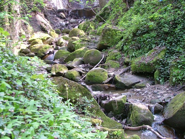 Botanical Garden in Cluj-Napoca